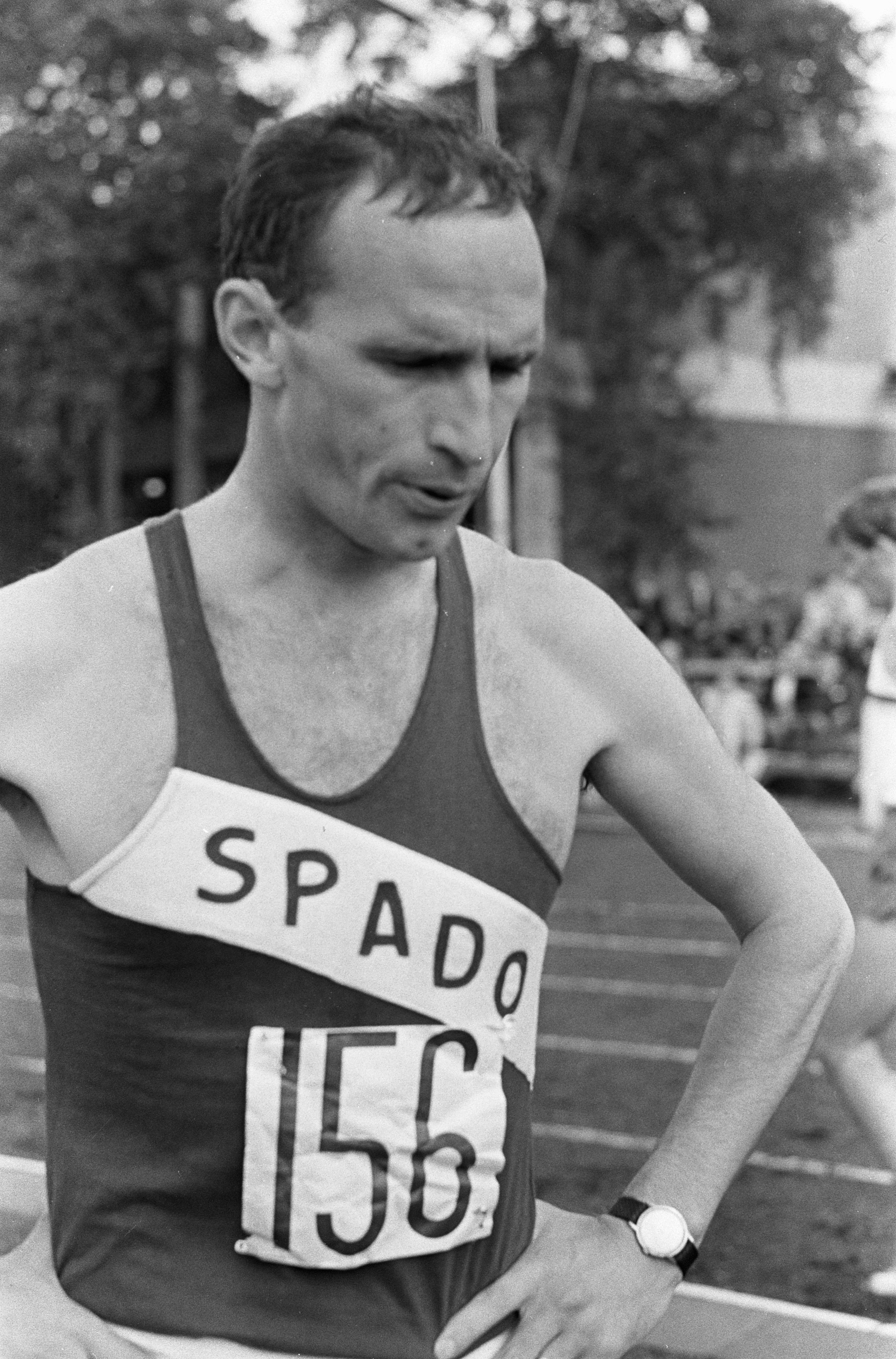 Collectie / Archief : Fotocollectie Anefo Reportage / Serie : [ onbekend ] Beschrijving : Nederlandse Atletiekkampioenschappen Rotterdam. Nummer 9 Finish 1500m heren 1e Snepvangers, 2e Huizenga, Datum : 13 augustus 1967 Locatie : Rotterdam, Zuid-Holland Trefwoorden : atletiek, finishen, kampioenschappen Fotograaf : Jongerhuis, Pieter / Anefo Auteursrechthebbende : Nationaal Archief Materiaalsoort : Negatief (zwart/wit) Nummer archiefinventaris : bekijk toegang 2.24.01.05 Bestanddeelnummer : 920-5977 Reacties Geplaatst door Sportliefhebber op 26 augustus 2016 - 16:50. Persoonsnaam: Snepvangers, Henk